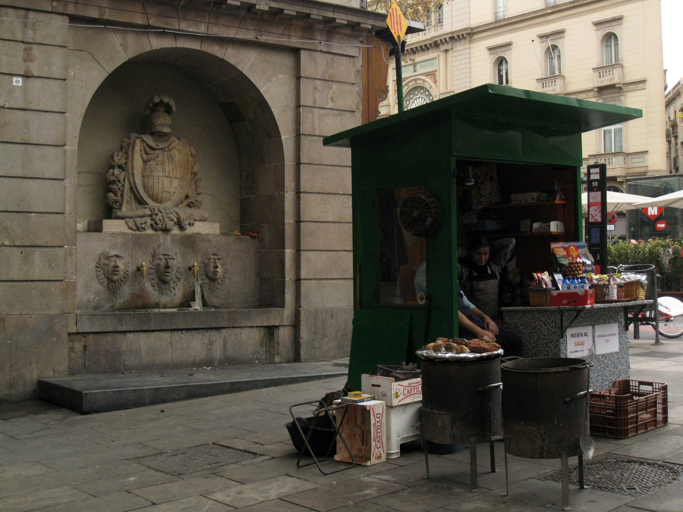 Font del Pla de la Boqueria, a l'Hotel Internacional (Barcelona)